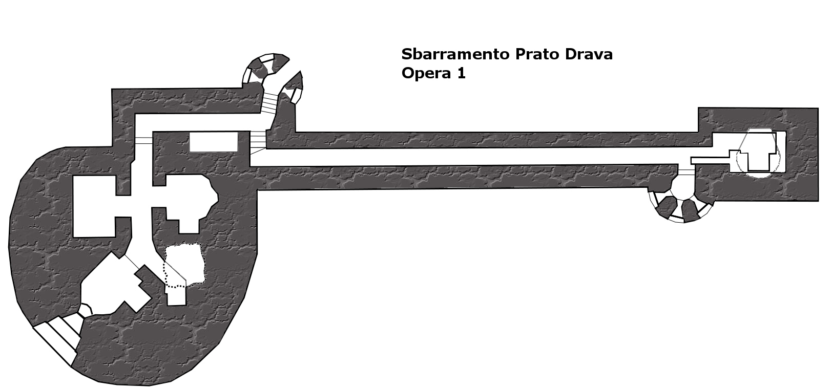 Opera 1 Prato Drava Piantina